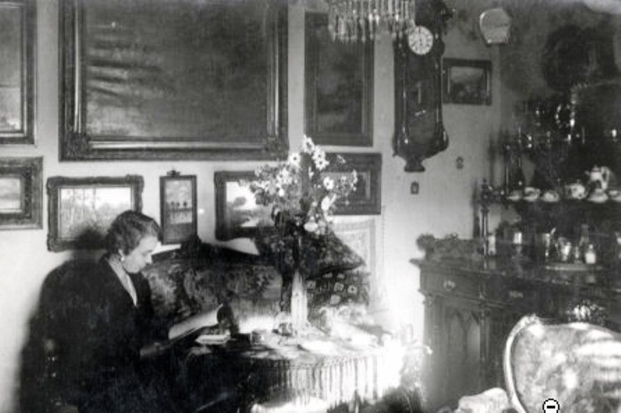 Báró Barkóczy Ilona elemi iskolai tanító lakása az Állami lakótelepen